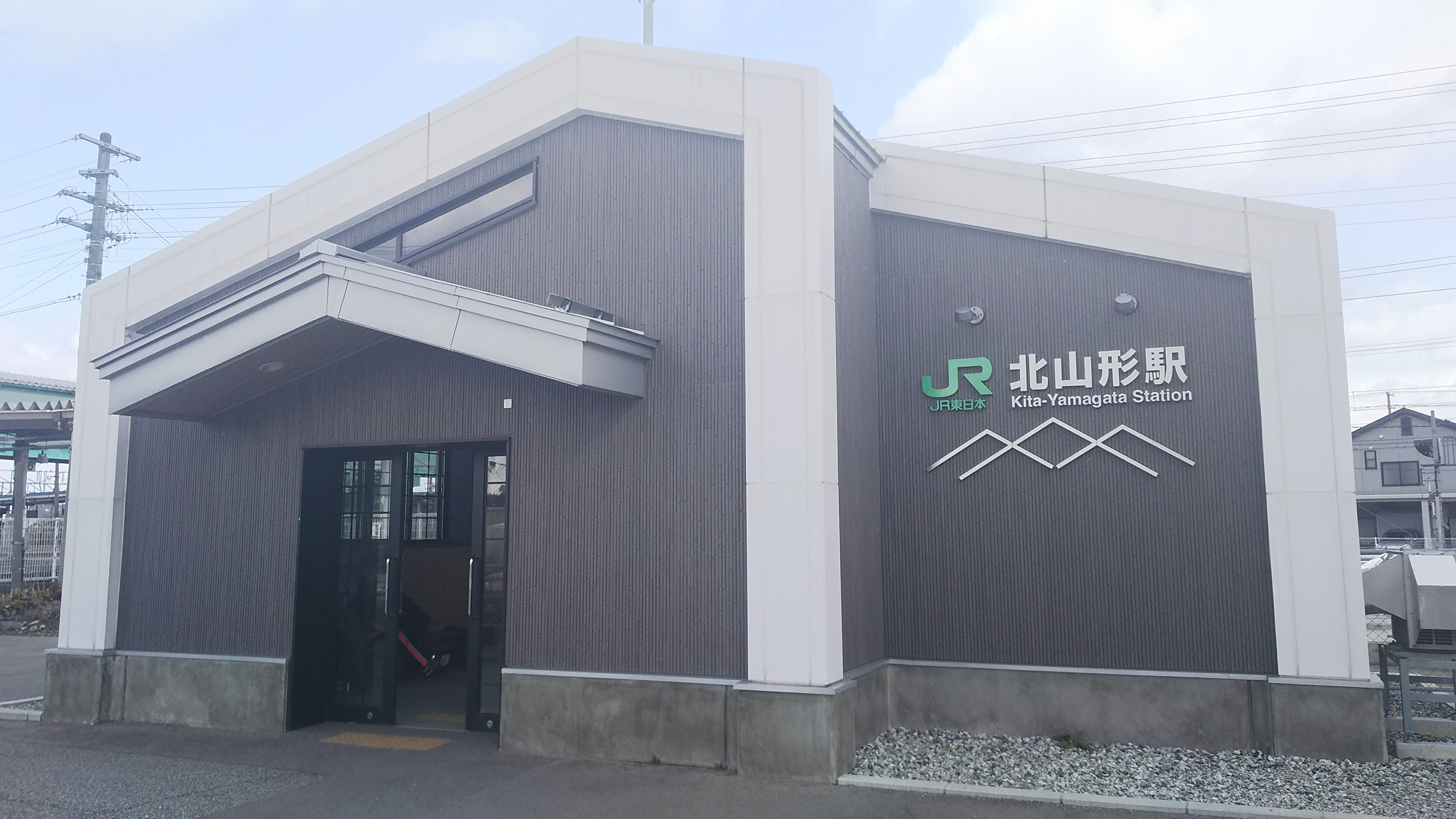 北山形駅西口駅舎（２０１７年３月）